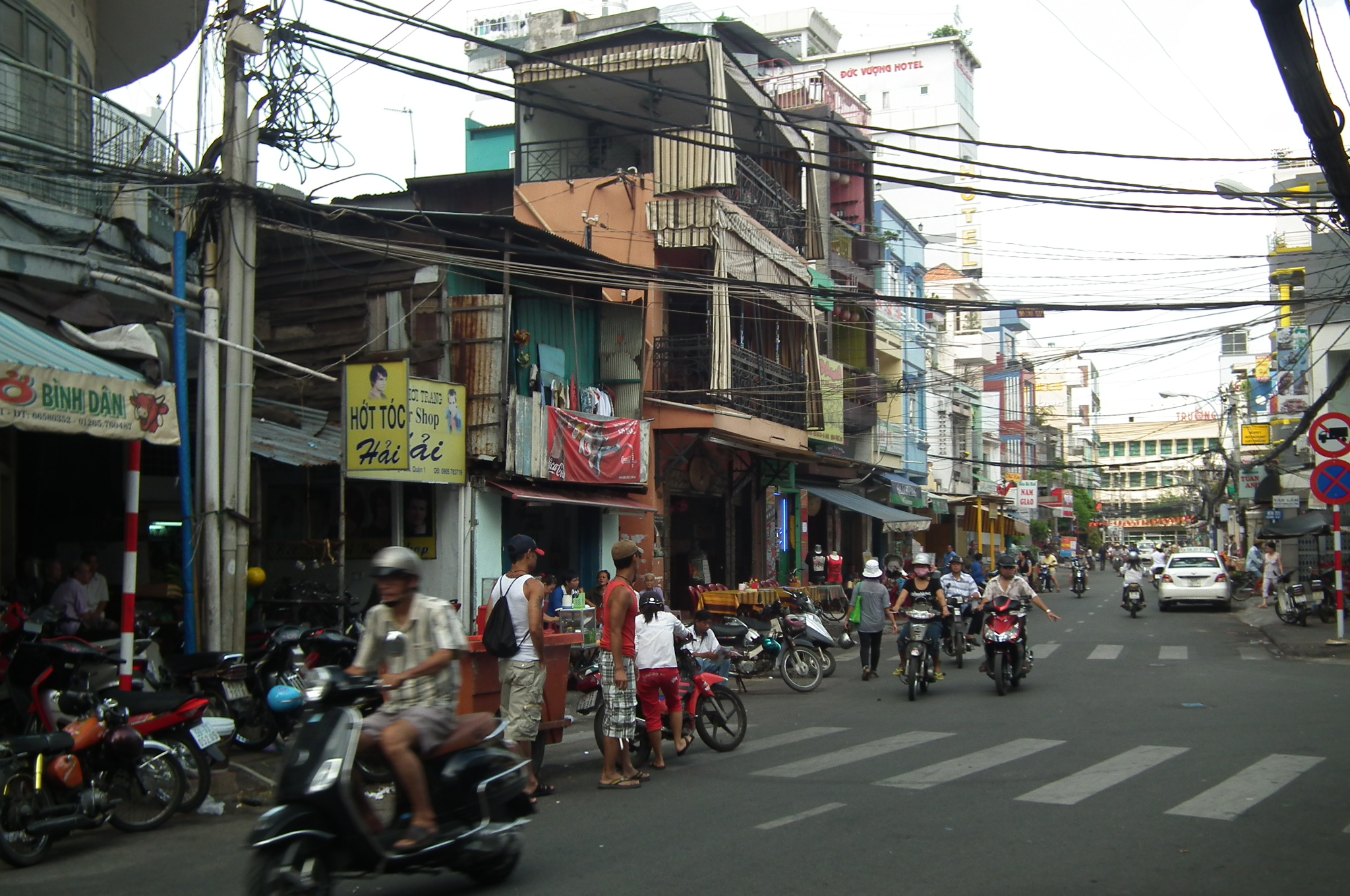 Bui Vien St.ブイヴィエン通り Thành phố Hồ Chí Minh 城舗胡志明 ホーチミン